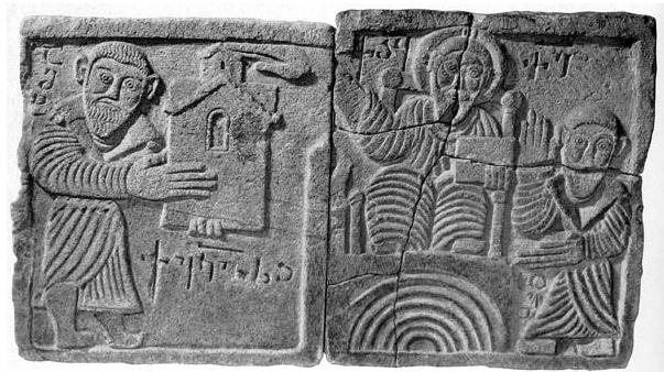 აშოტ კურაპალატი. ოპიზა